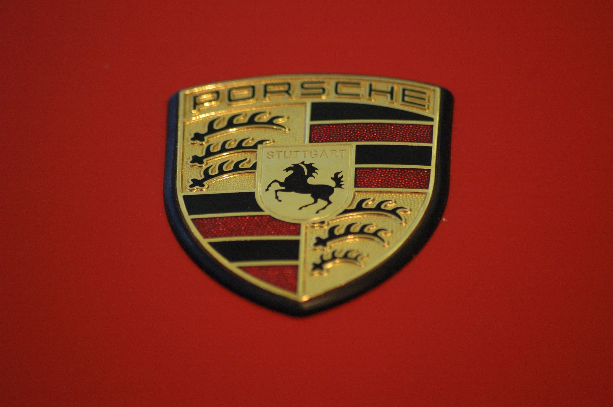 Porsche emblem on a red PorschePorsche